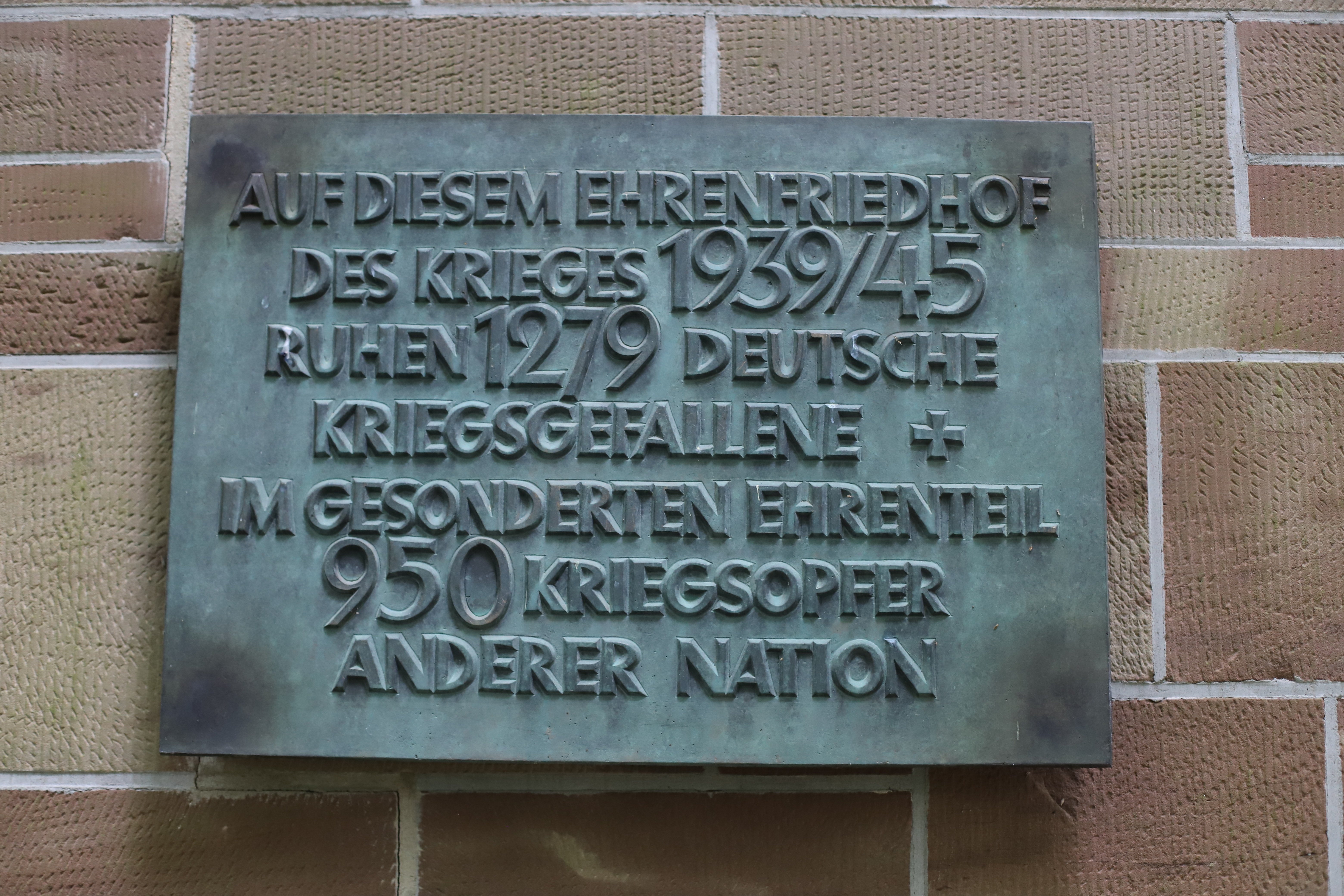 Schild am Eingang des Ehrenfriedhofs Besch: "Auf diesem Ehrenfriedhof des Krieges 1939/45 ruhen 1279 deutsche Kriegsgefallene. Im gesonderten Ehrenteil 950 Kriegsopfer anderer Nation."